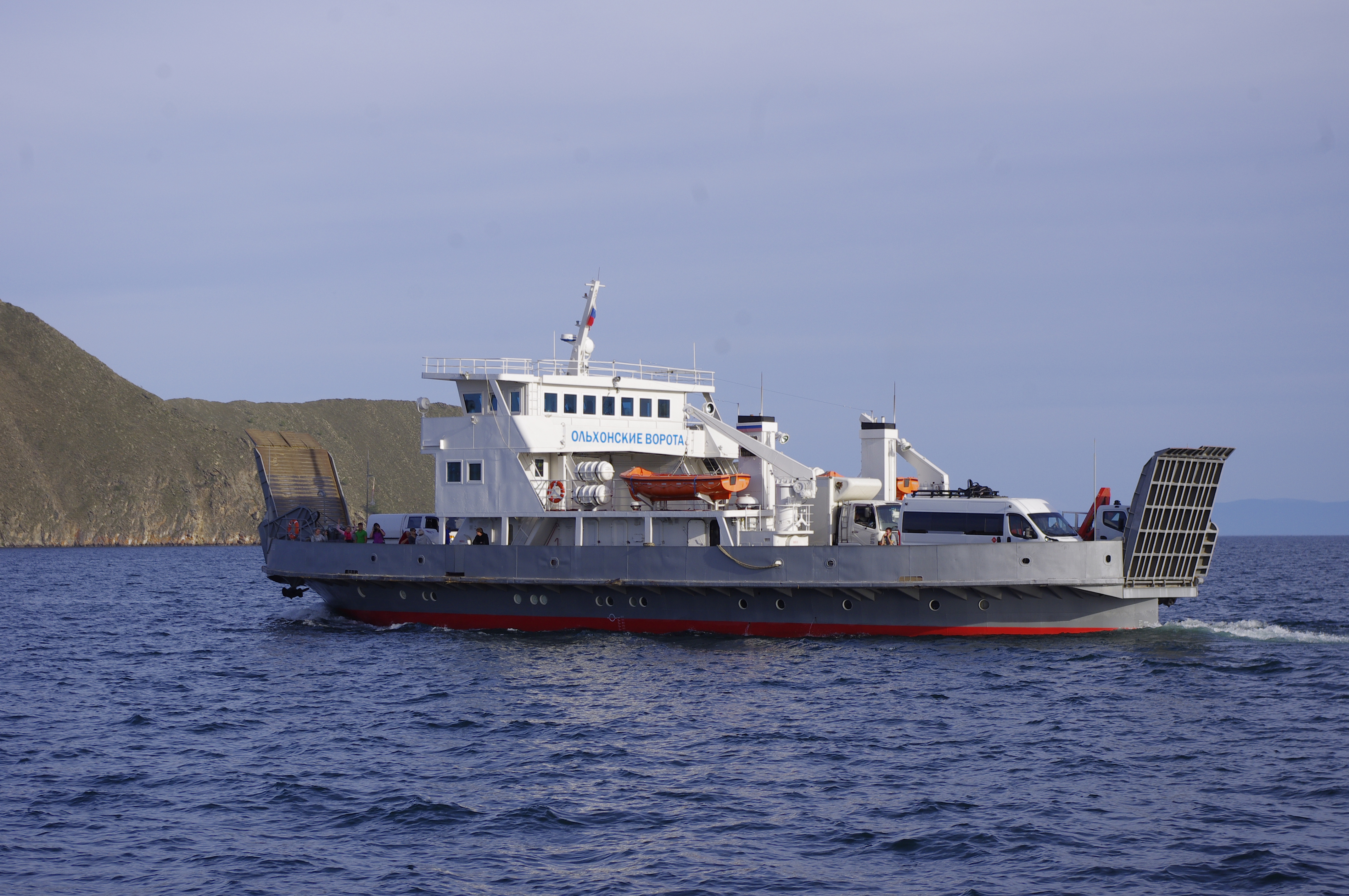 W cieślinie Olchońskie Wrota.